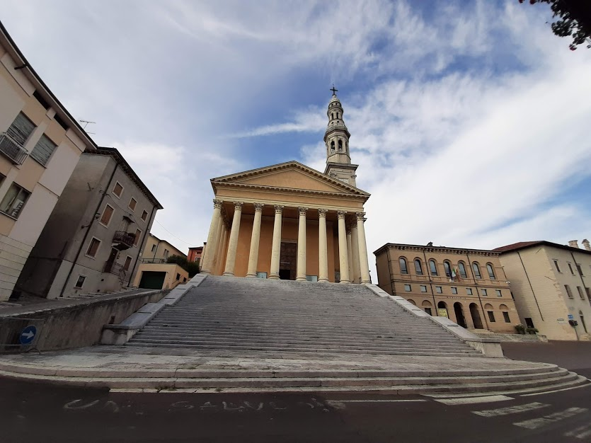 Veduta della facciata (e del campanile) della chiesa parrocchiale di S. Maria Maggiore, della facciata del Municipio e di parte del Palazzo Vescovile di Monteforte d'Alpone (VR).